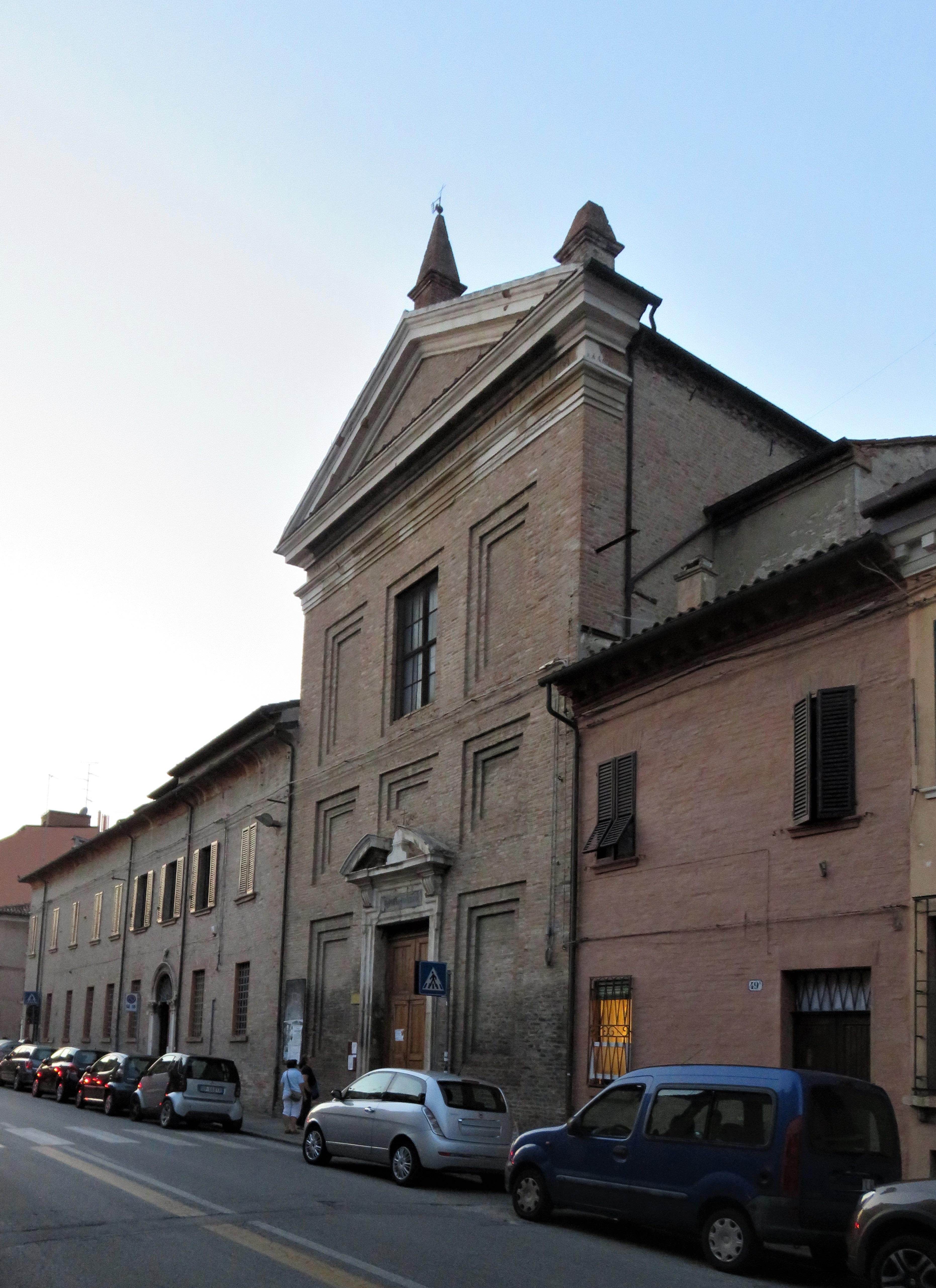 Facciata su via XX Settembre